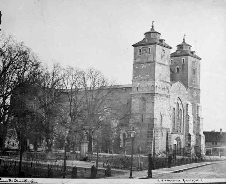 Kyrkan från nordväst. Innan restaurering omkring 1870-talet. Ur C.G. Brunius samling.